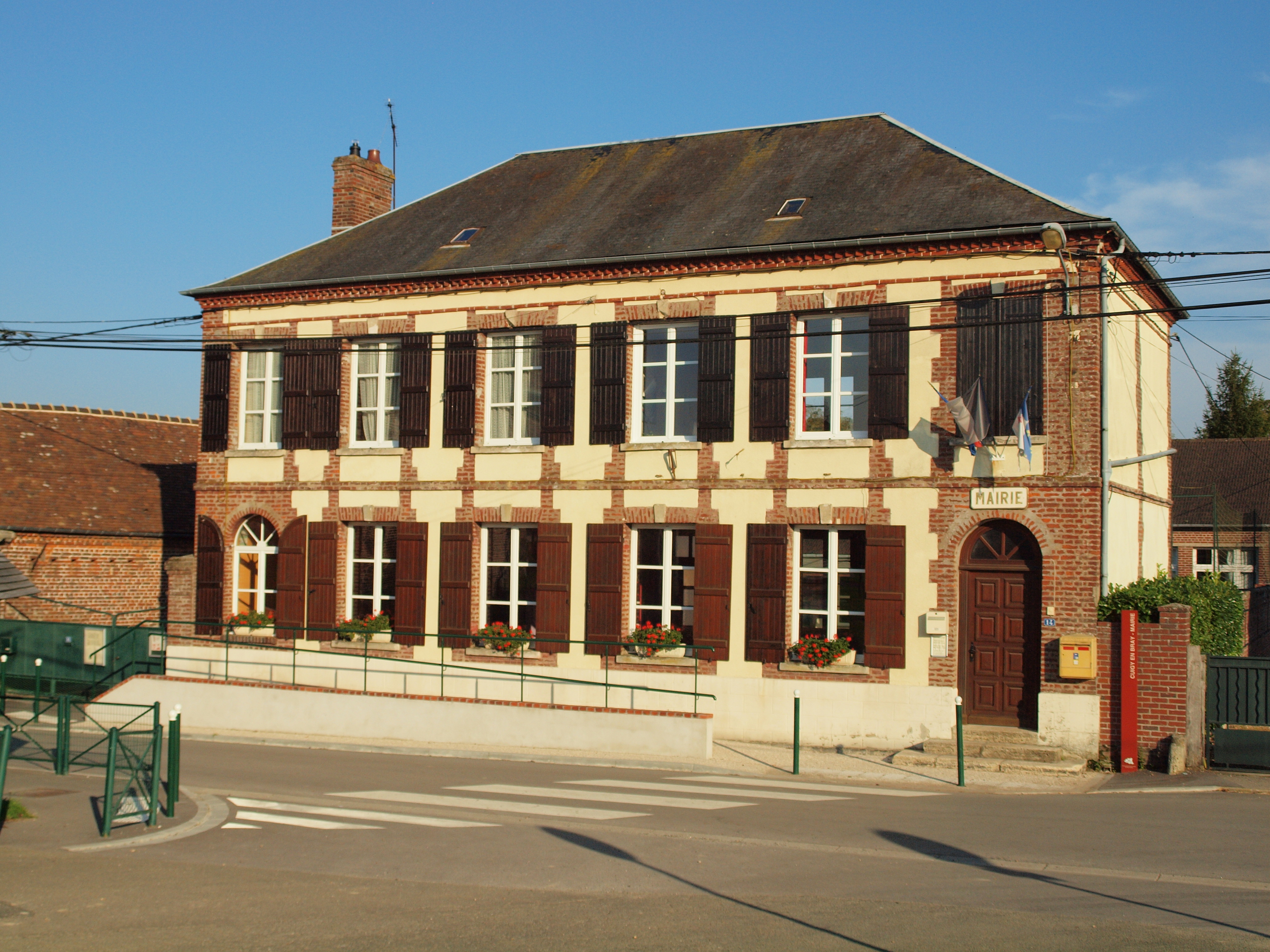 Cuigy-en-Bray (Oise, France)